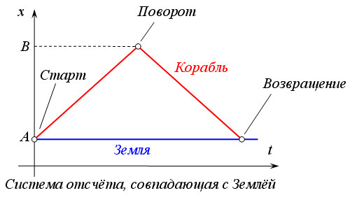 Парадокс близнецов с точки зрения инерциальной системы отсчёта, связанной с Землёй.